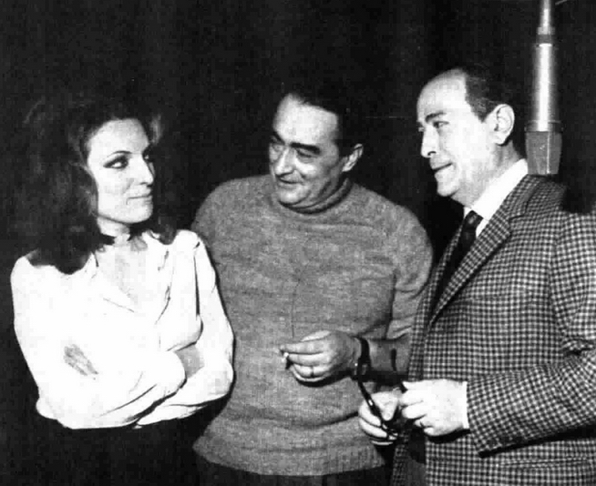 Fioretta Mari, Carlo Ludovici and Lucio Rama at Italian Radio Rai